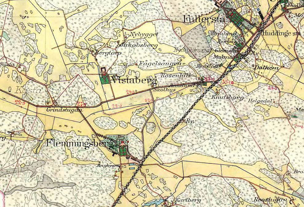 gårdarna Fullersta, Vistaberg, Flemingsberg